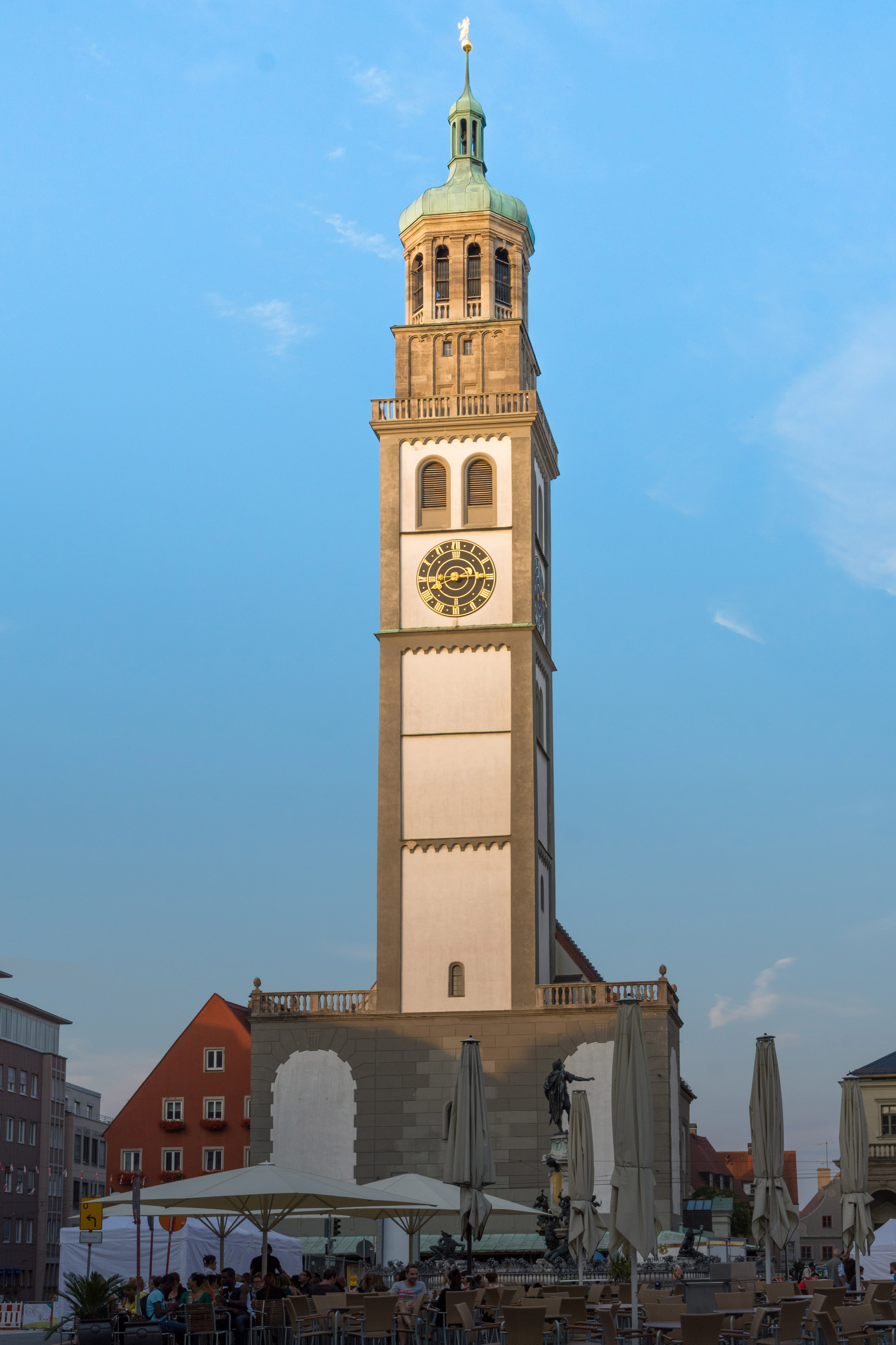 Augsburg Perlachturm